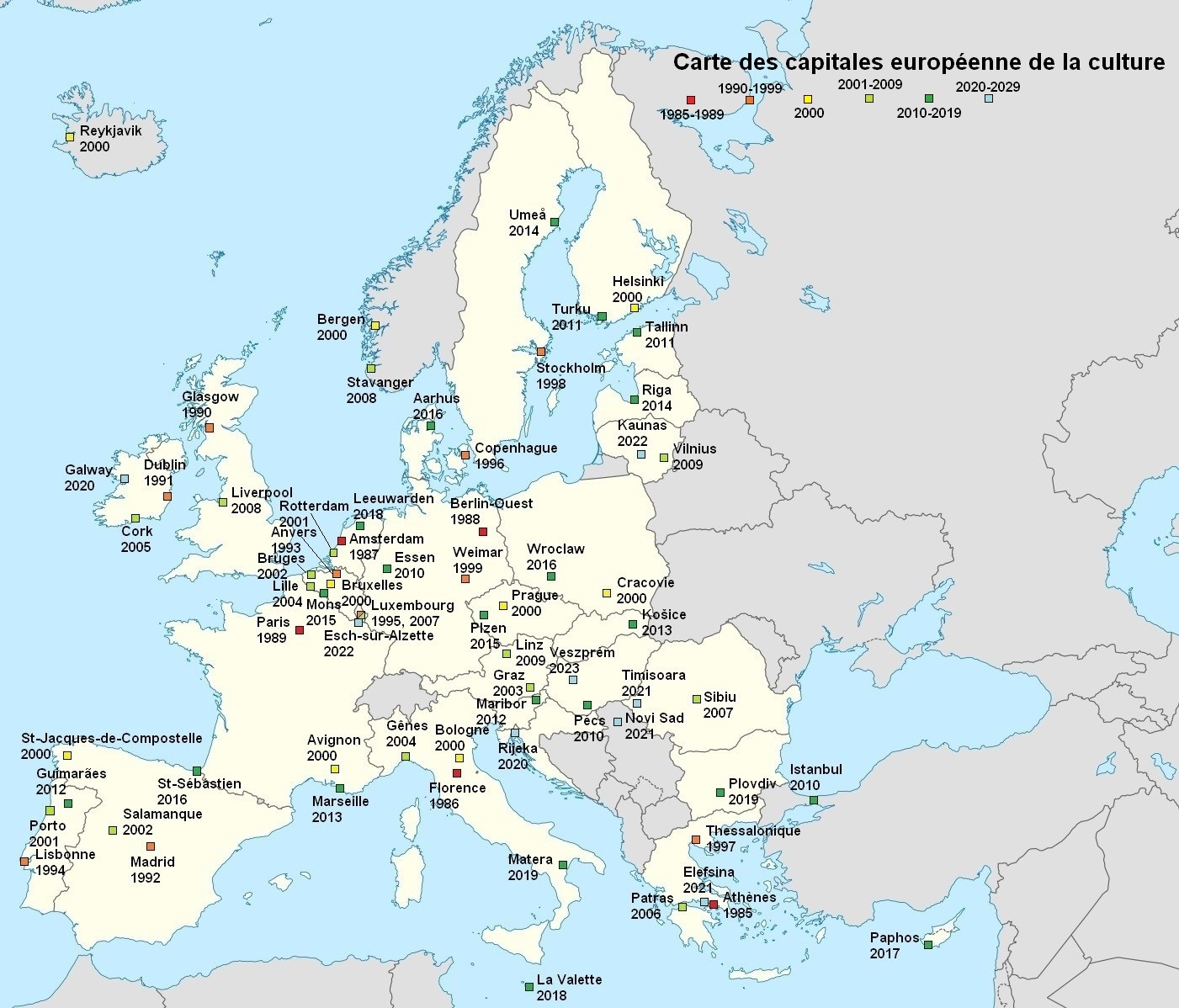 Montre les capitales européennes de la culture depuis sa création en 1985